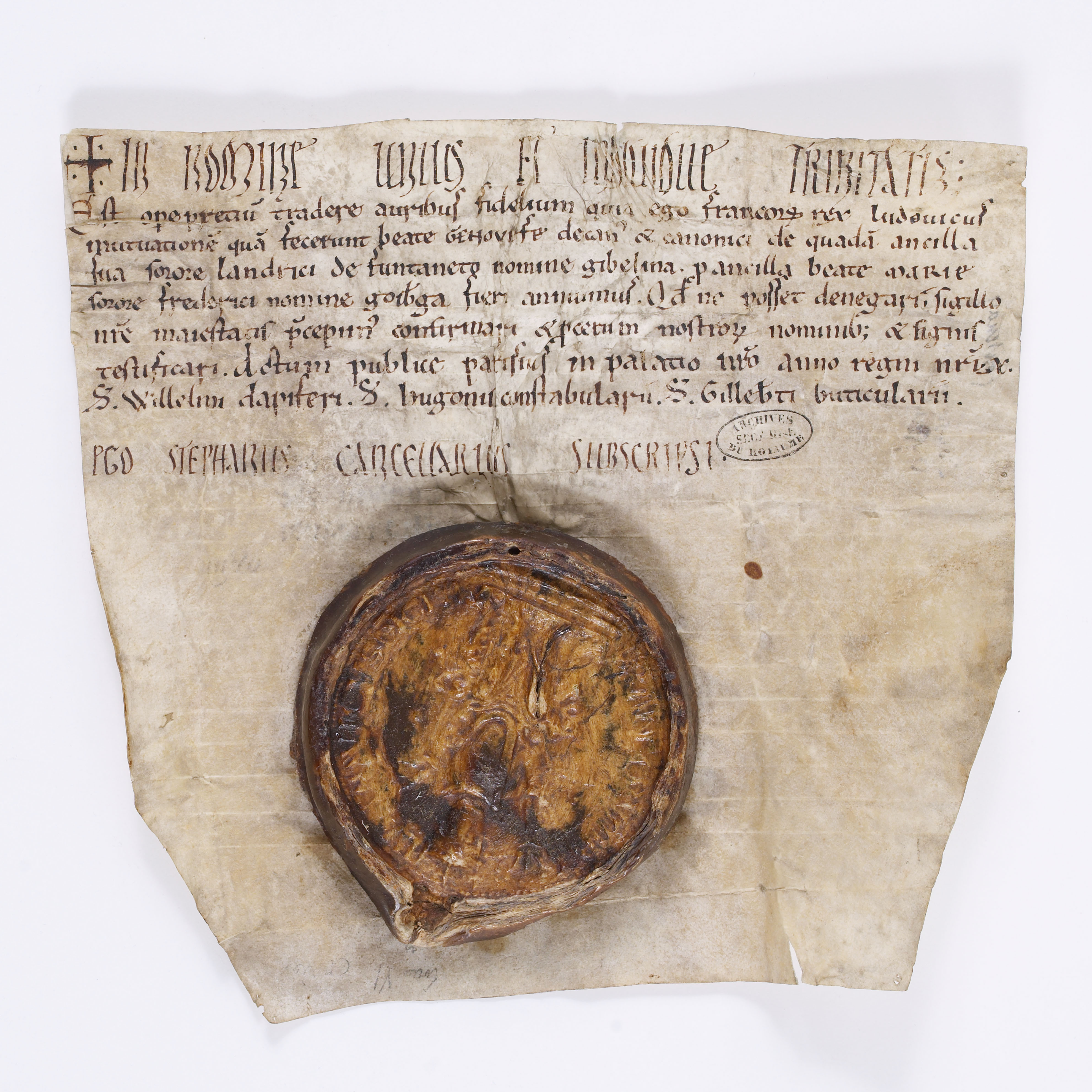 Le roi Louis VI le Gros confirme un échange de deux serves entre le chapitre cathédral de Notre-Dame de Paris et les chanoines de l'abbaye de Sainte-Geneviève. Diplôme royal scellé d'un sceau plaqué de cire brune, daté de 1118, en latin.